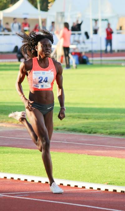 Noélie Yarigo Courant lors d'une compétition